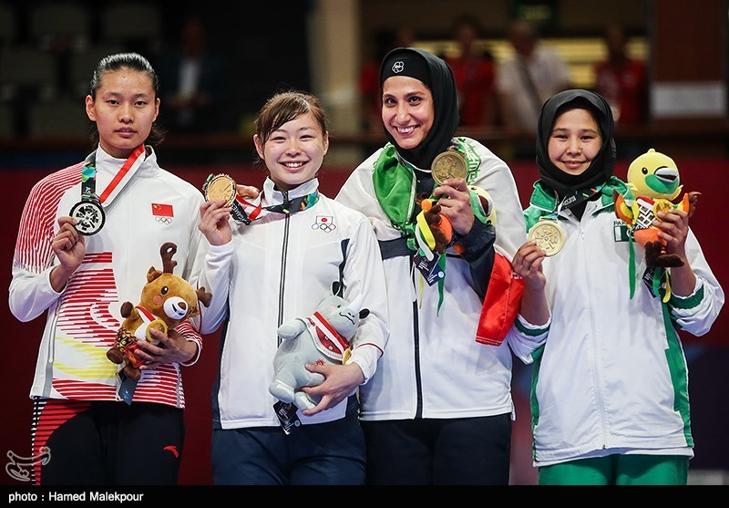 حمیده عباسعلی در مسابقه رده‌بندی کاراته بازی‌های آسیایی ۲۰۱۸